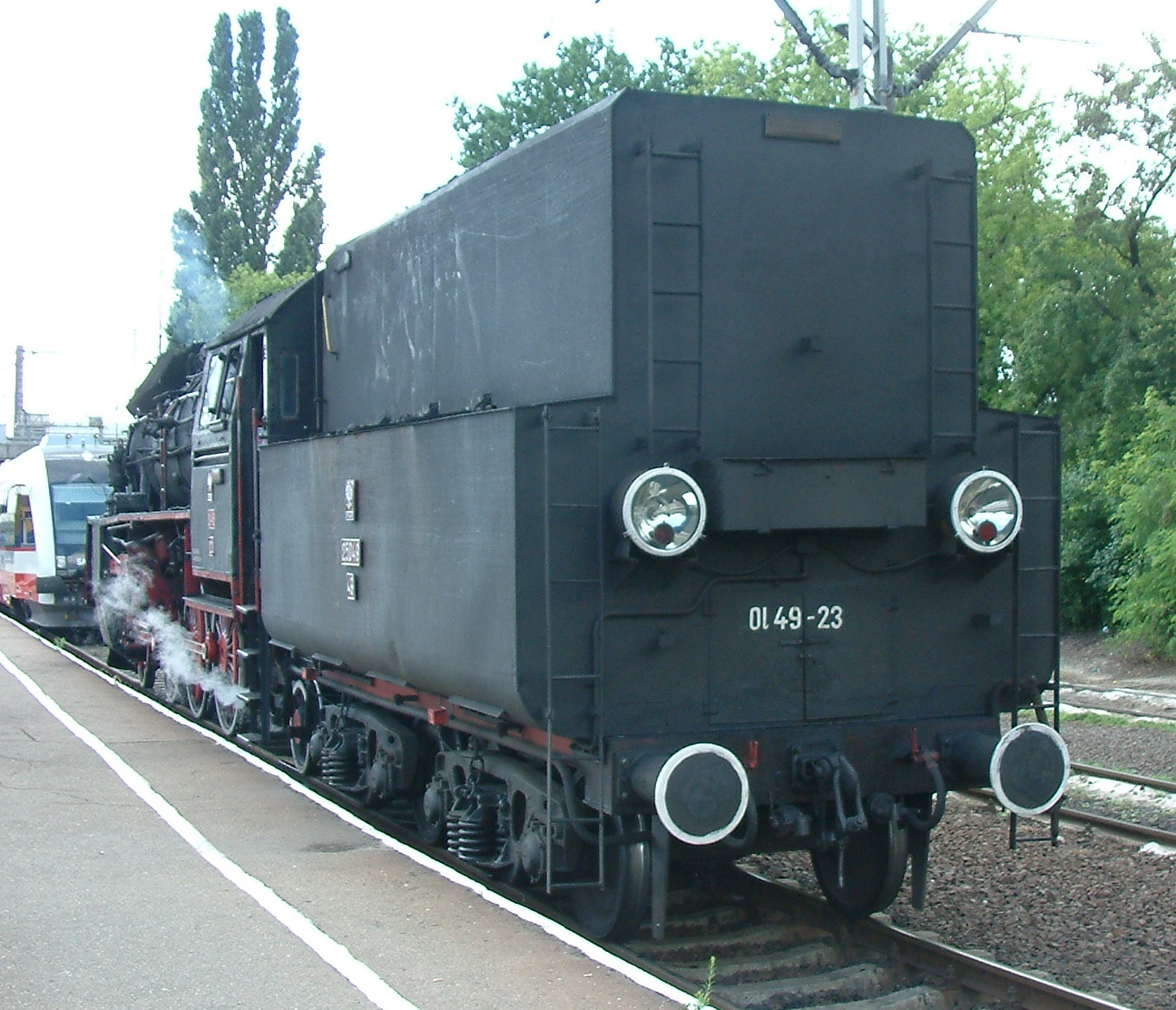 Locomotive Ol49-23 in Poznań